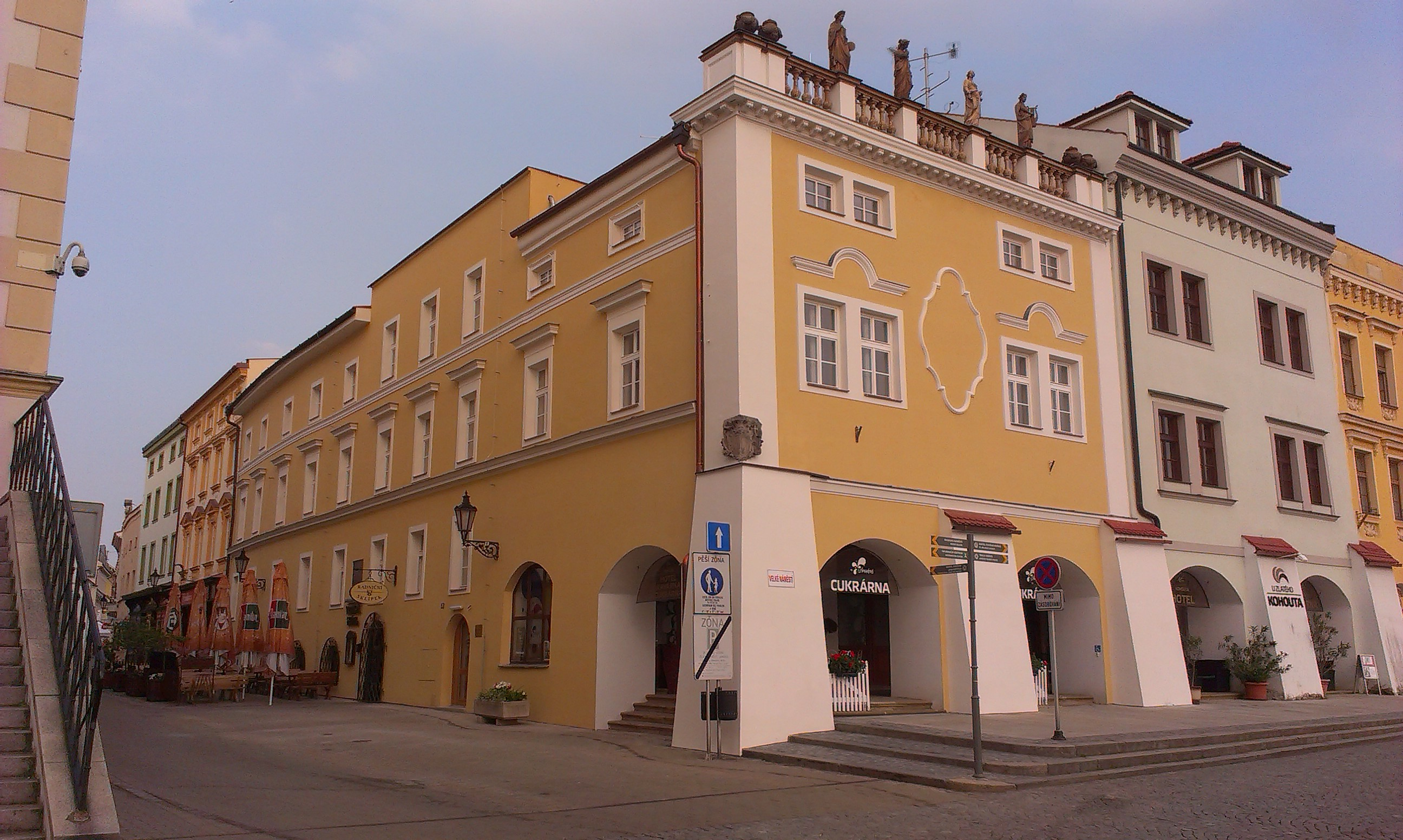 Kovářská 2, Kovářská 20/2, Velké náměstí, Kroměříž.